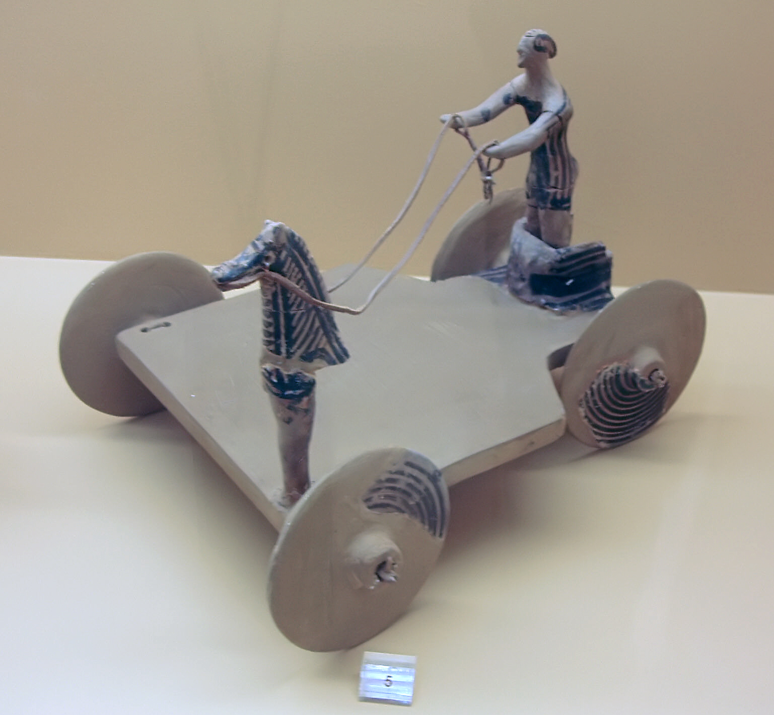 antikes Spielzeug (?), Stoa, Athen